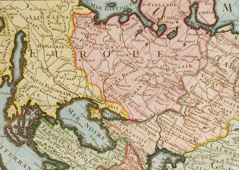 Фрагмент Європейської частини карти "Carte d'Asie, dressée pour l'Usage du Roy.". Бібліотека Софійського університету (Токіо, Японія)